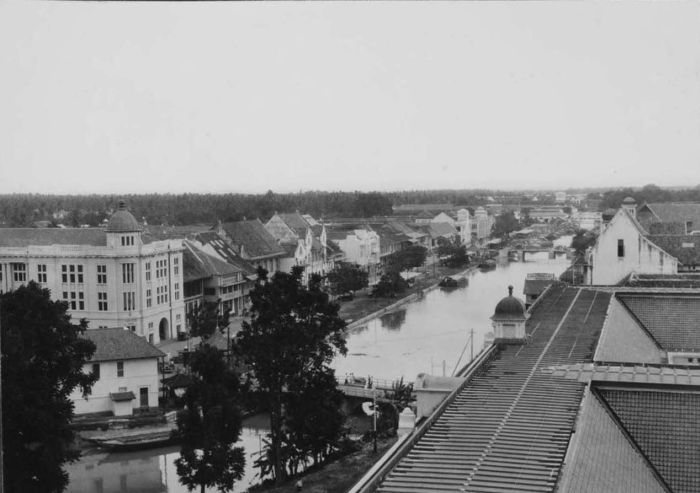 Foto. Gezicht op de Kali Besar in Batavia. Aan weerszijde van de rivier woningen. De foto is met een goude kleur omrand. . Gezicht op de Kali Besar , Batavia